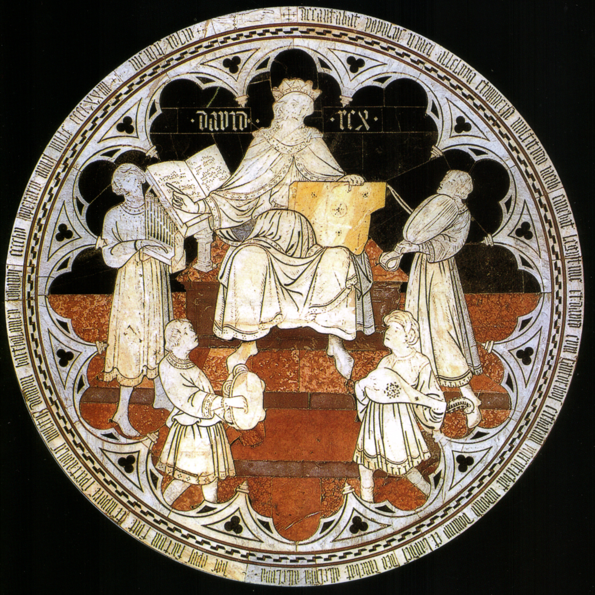 Pavimento di siena, davide salmista (domenico di niccolò dei cori)